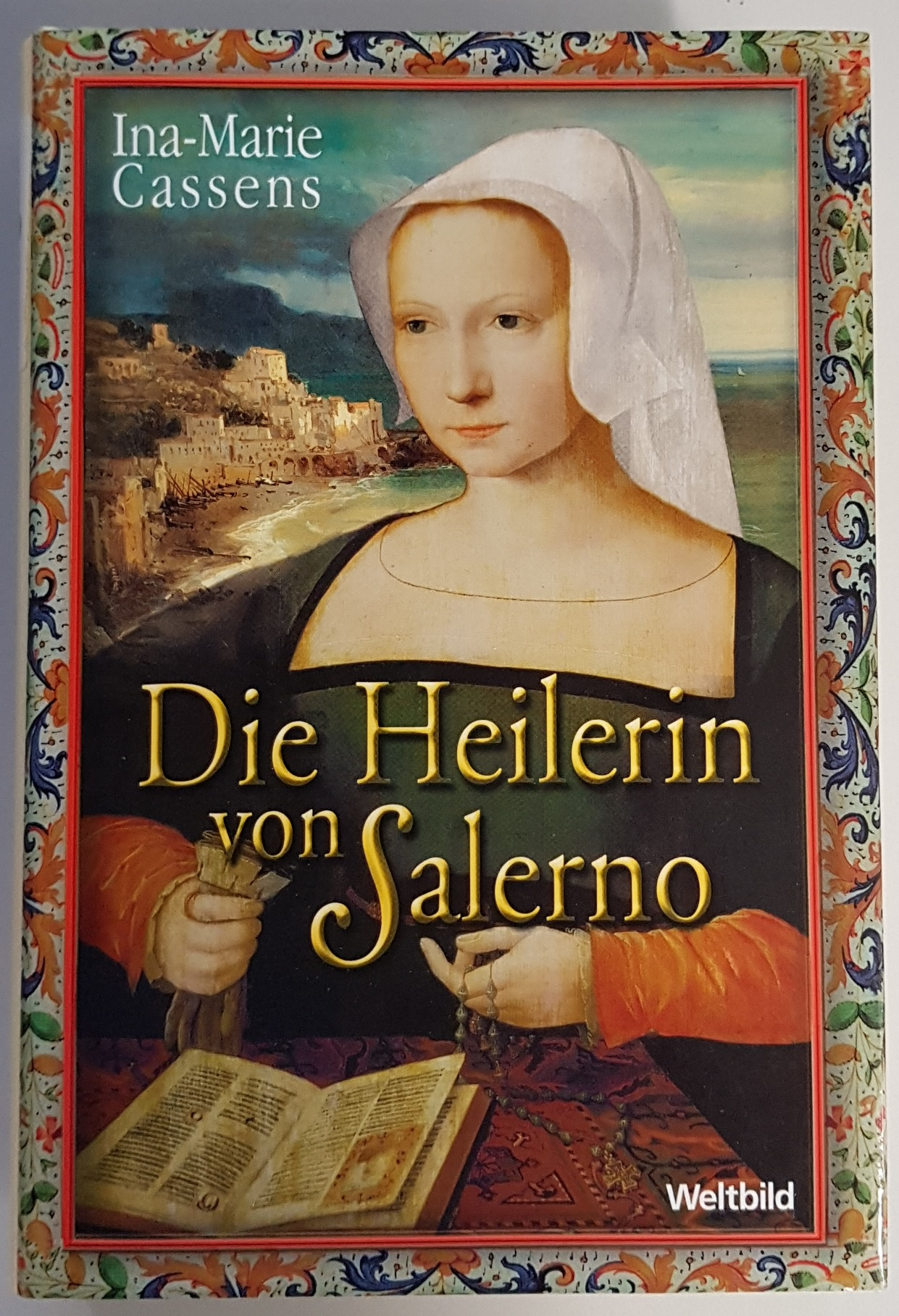 Aufnahme des historischen Romans "Die Heilerin von Salerno" von Ina-Marie Cassens